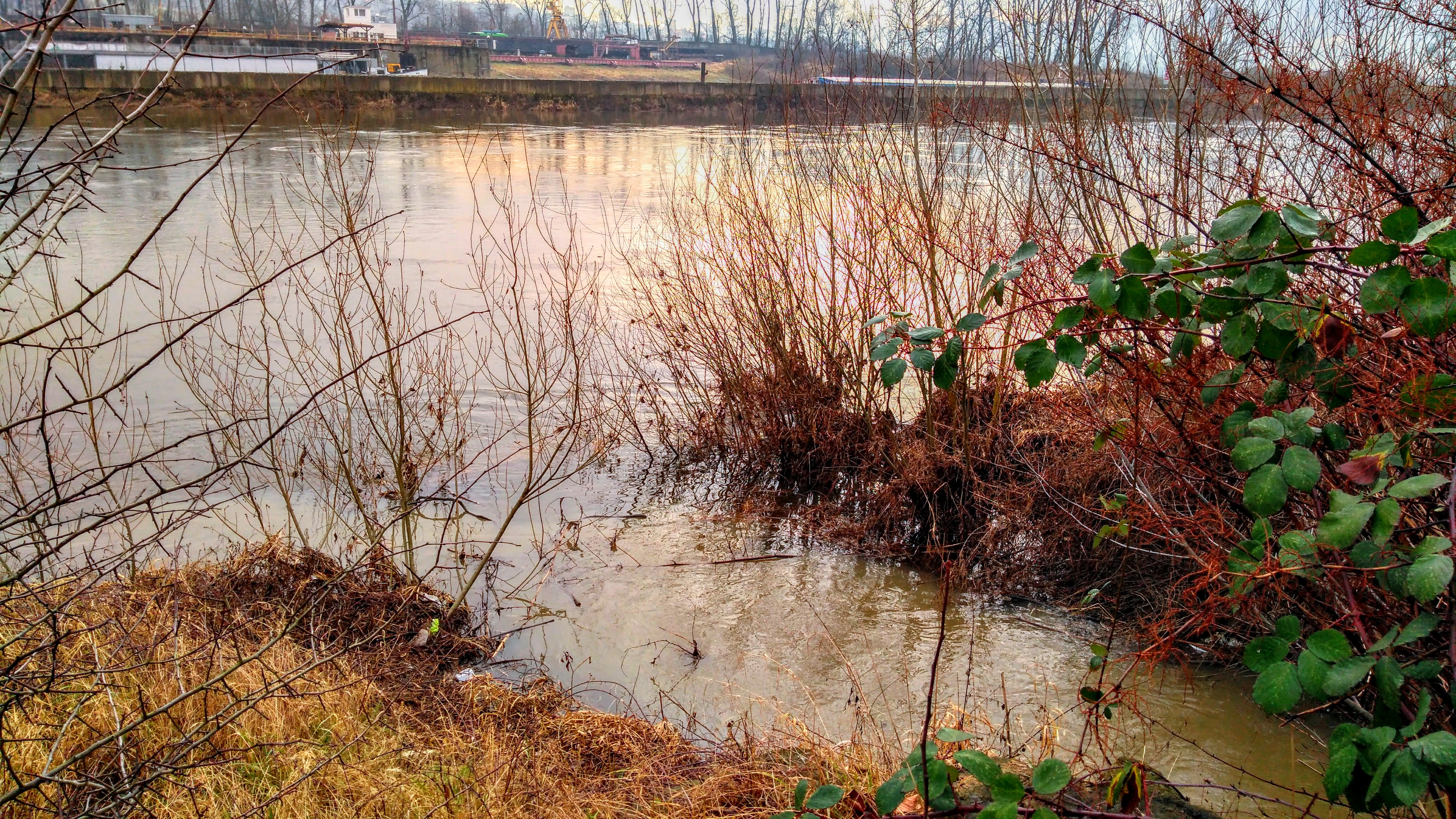 Soutok.